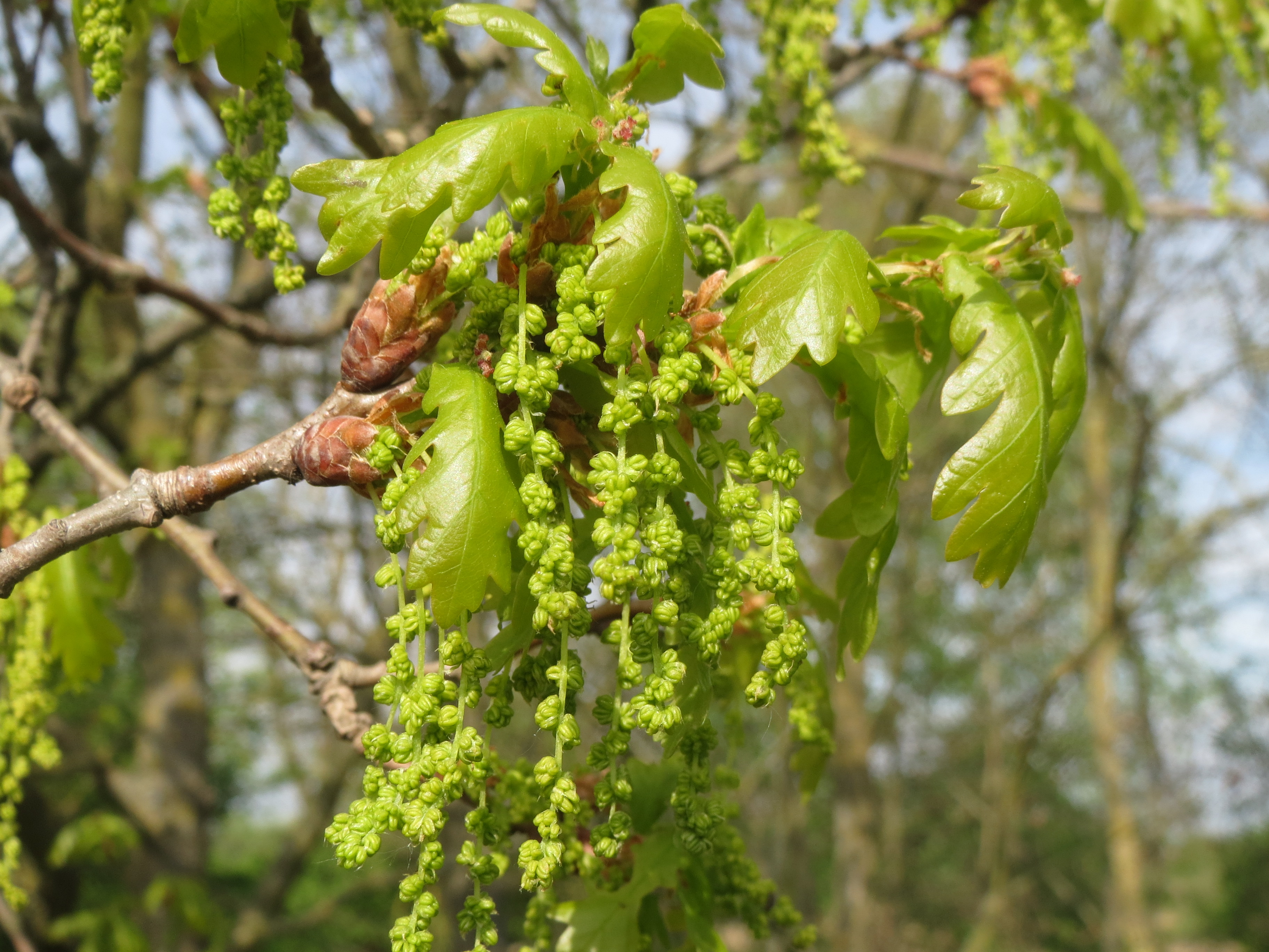 Stieleiche (Quercus robur) bei Reilingen